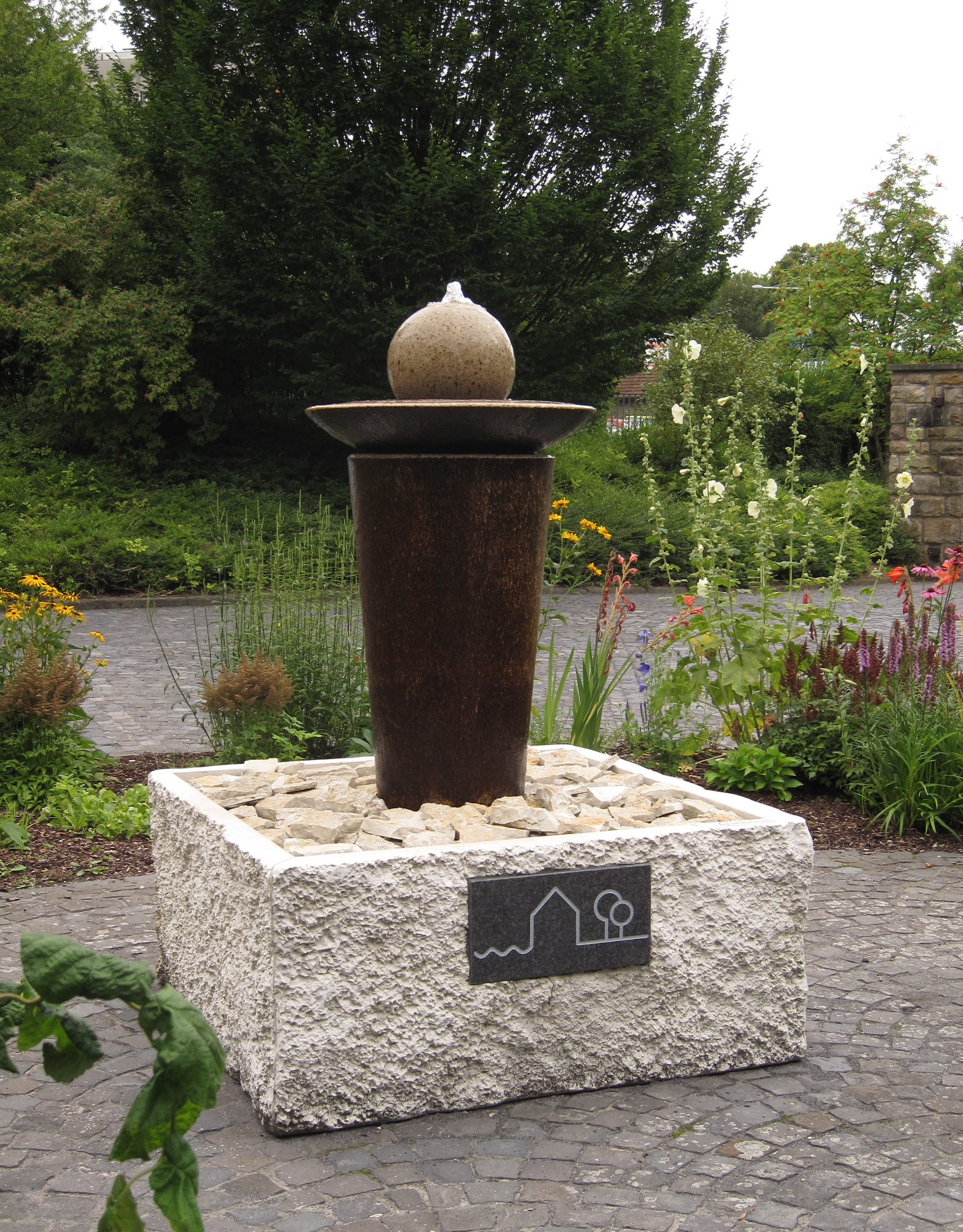 Brunnen im Eingangsbereich der Internatsschule am Seilersee in Iserlohn.